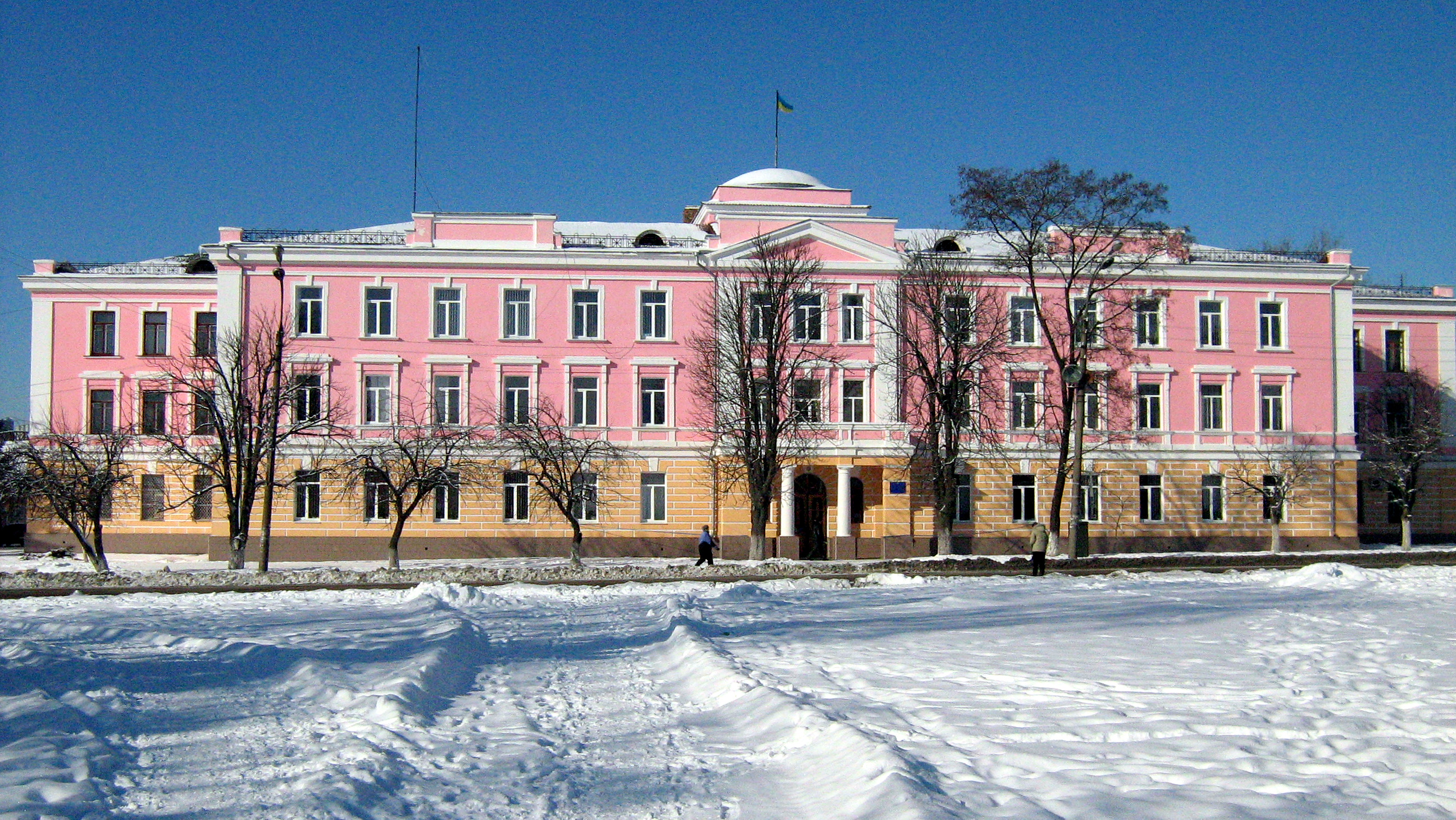 Будинок райдержадміністрації Шепетівщини